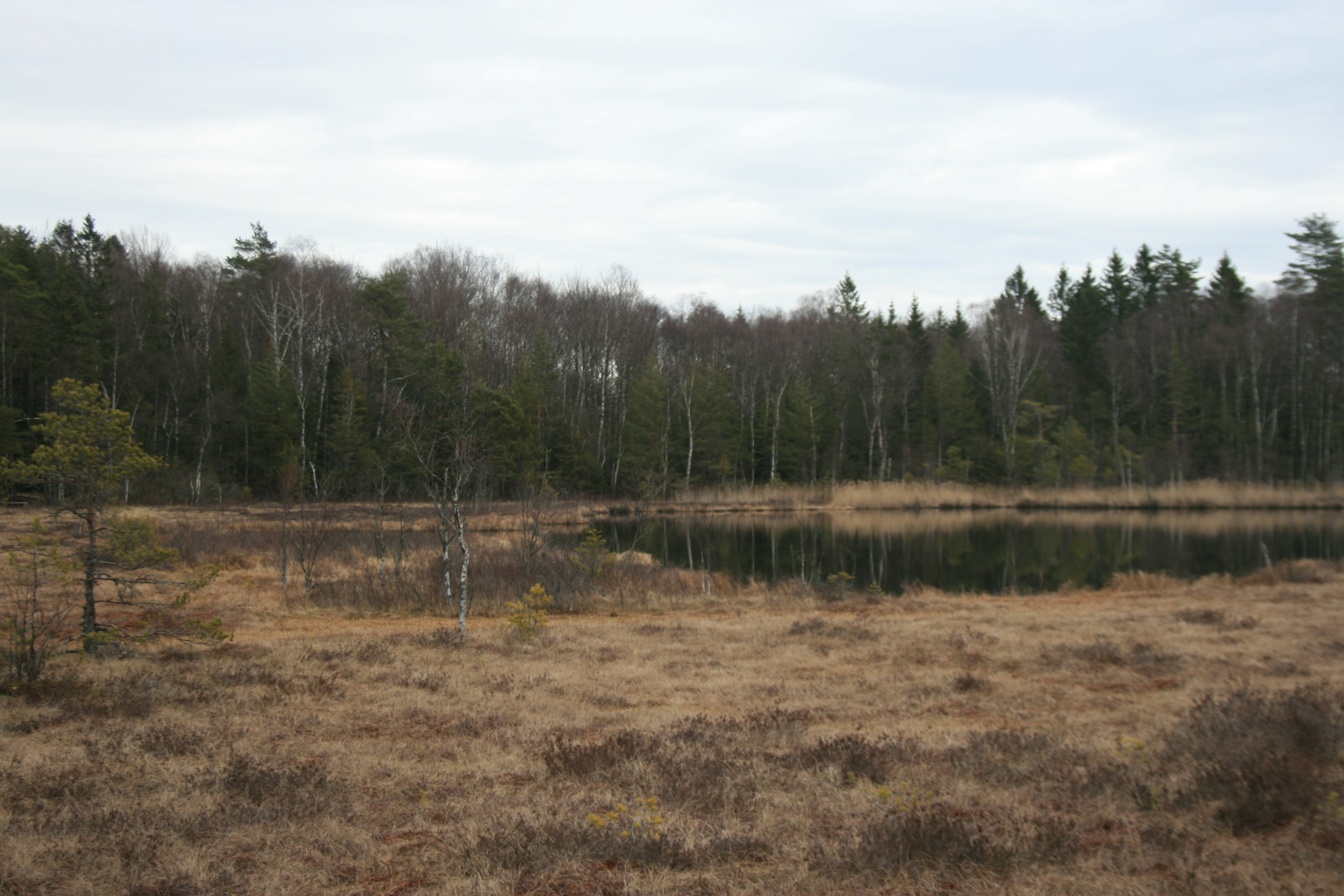 Adalstjernet på Bakkenteigen.